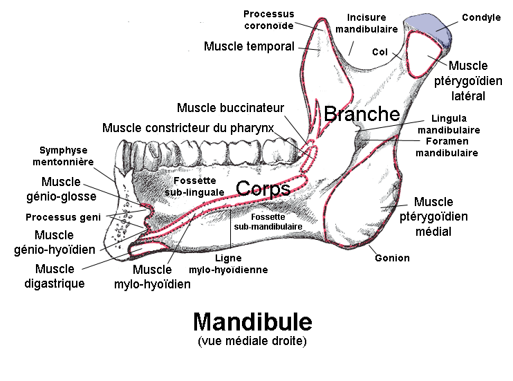 Mandibule. Vue médiale droite. Anatomie humaine